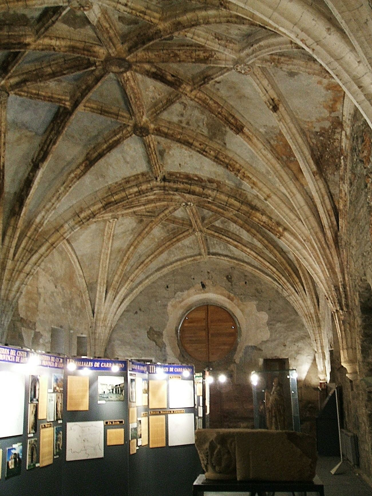 Refectorio del Monasterio de Santa María de Carracedo, en Carracedo del Monasterio, León, España